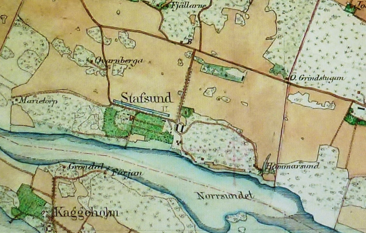 Stafsunds herrgård på häradskarta 1901-06